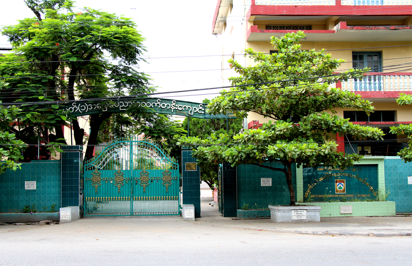 မြန်မာဘာသာ: အမှတ်(၁) အထက်တန်းကျောင်း(မန္တလေးမြို့) ယောက်ျားလေးကျောင်း